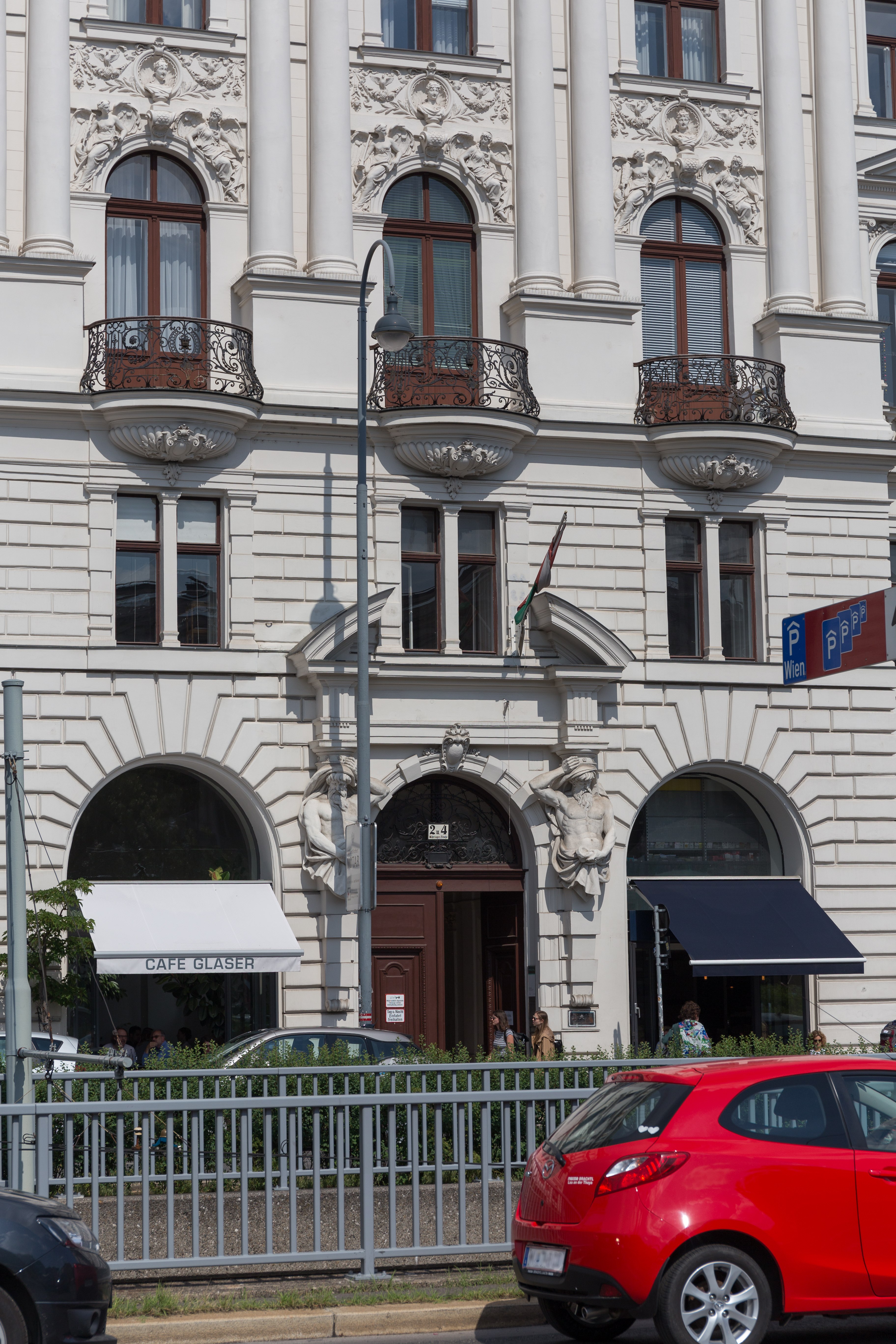 Ambassade d'Oman à Vienne.